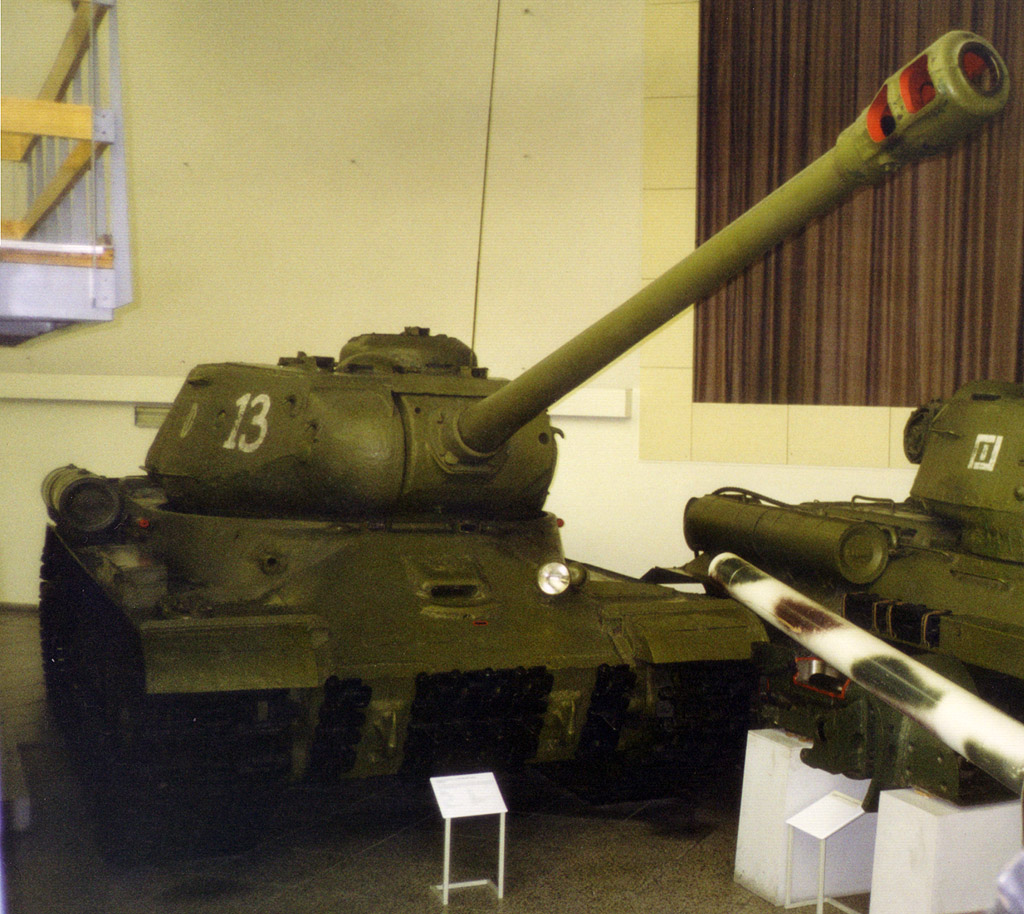 Soviet tank IS-2, on display in the Militärhistorischen Museum der Bundeswehr in Dresden